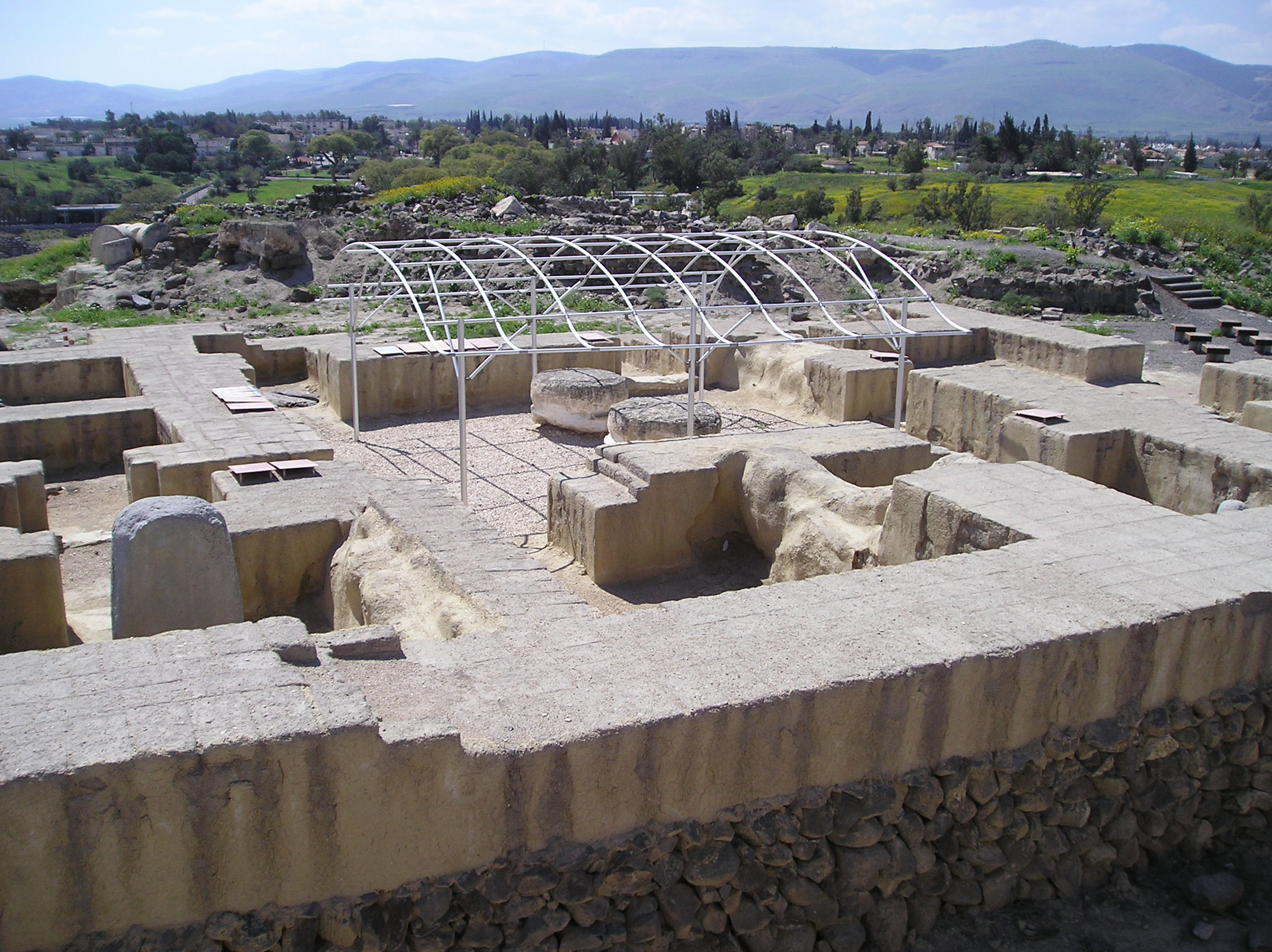 Bet Szean (stanowisko archeologiczne - Scytopolis) w Izraelu. Na pierwszym planie pozostałości antycznego domu egipskiego gubernatora.